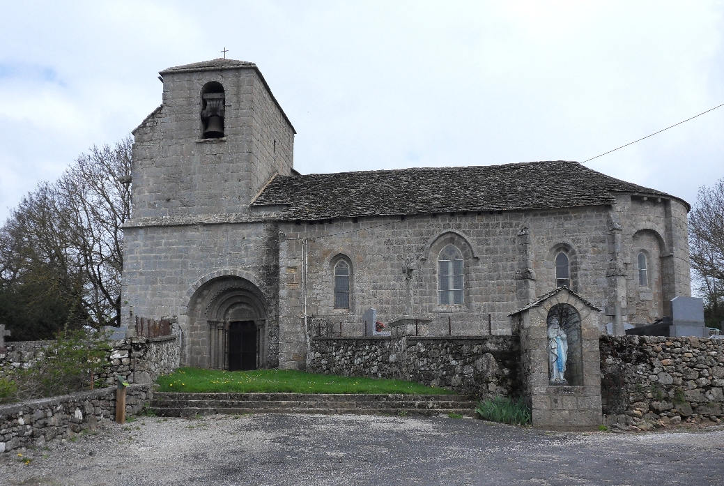 Église Saint-Amans (Classé) .